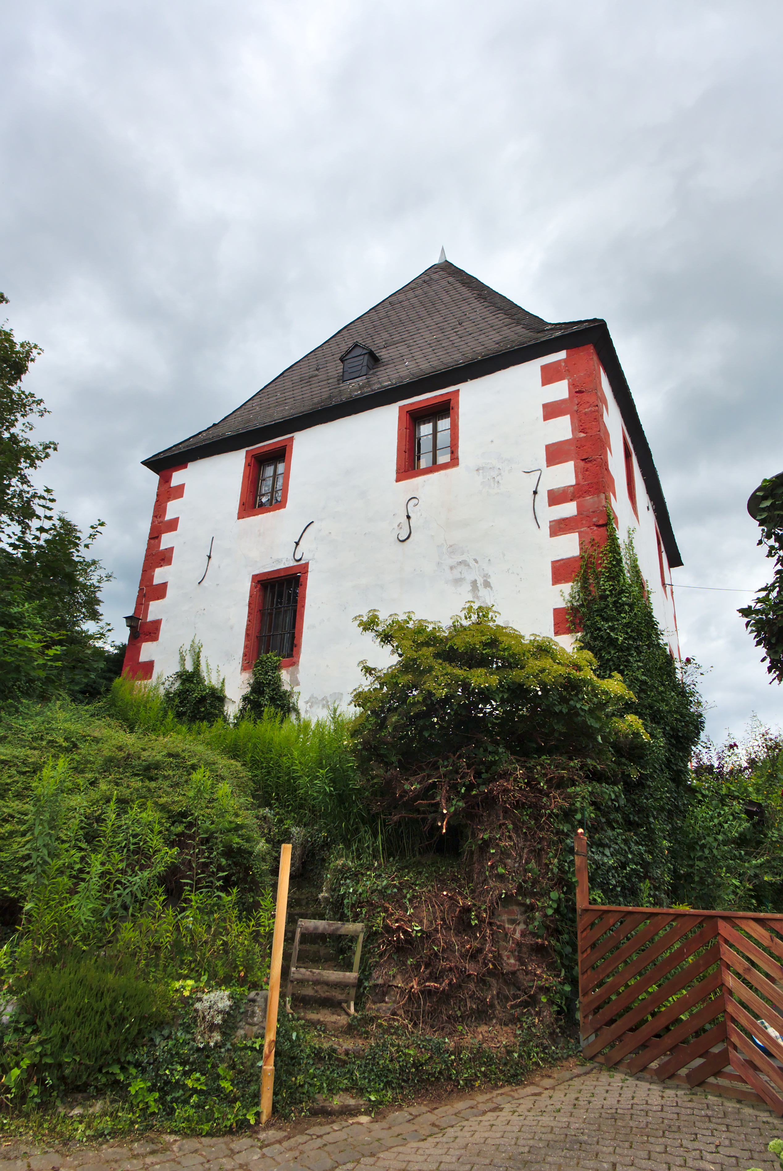 Denkmalgeschützter Zehntturm, Turmweg 32, Remagen-Bandorf